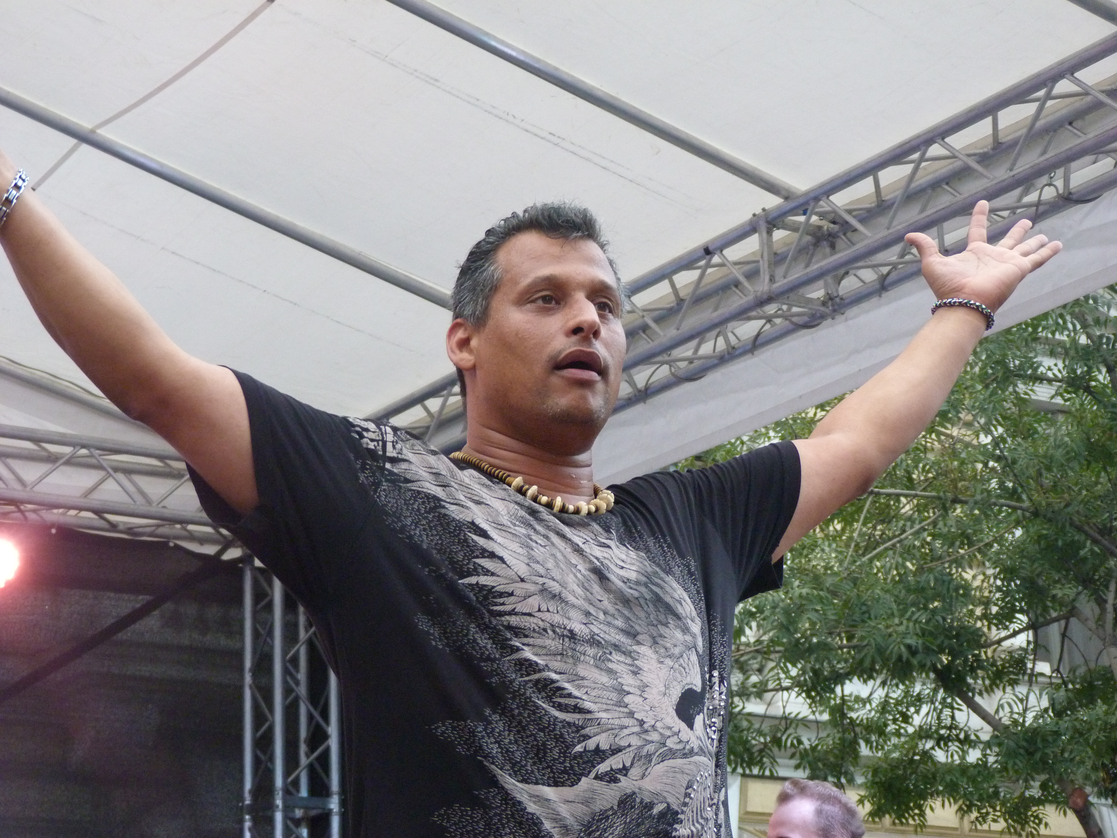 A felvétel 2014. szeptember 21-én vasárnap készült Budapesten, az Andrássy úton. Autómentes Nap. ©© Derzsi Elekes Andor, Budapest, 2014, A kép egészben, vagy részletekben másolását, bármilyen úton történő sokszorosítását és felhasználását a szerző ellenérték nélkül, jogutódjaira is kihatóan megengedi. Az engedély kiterjed a kereskedelmi célú hasznosításra is. Kéri azonban nevének feltüntetését a felhasználás során. A Metapolisz sorozat valamennyi képe és filmje Creative Commons alatti valamint kereskedelmi - for profit - célra is felhasználható. Ajánlott hivatkozás: Derzsi Elekes Andor: Metapolisz DVD line